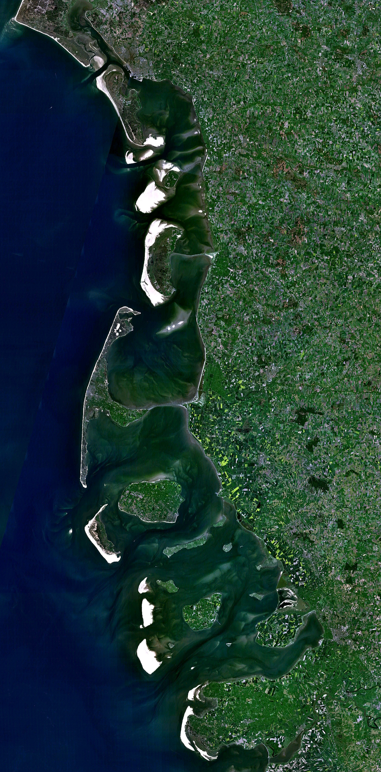 Satellitenaufnahme der Nordfriesischen Inseln (Dänemark/Deutschland)